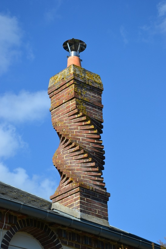 Cheminée en tire bouchon